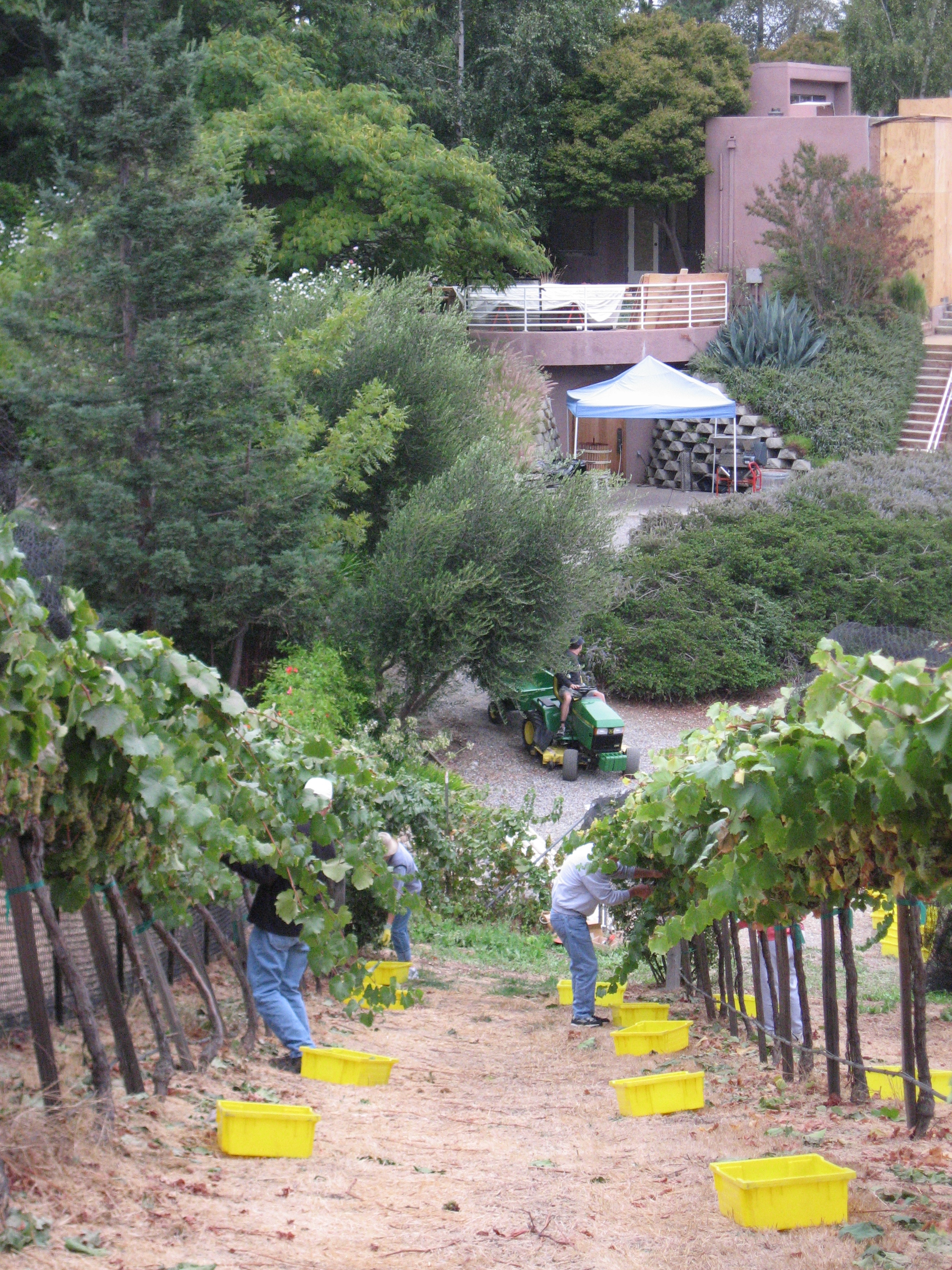 Vendanges à Los Altos sur un vignoble de chardonnay conduit en hautain